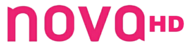 Novahd